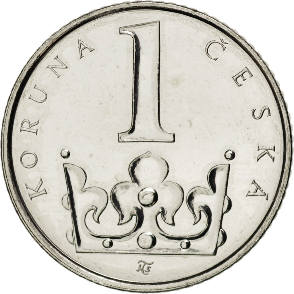 1 korona